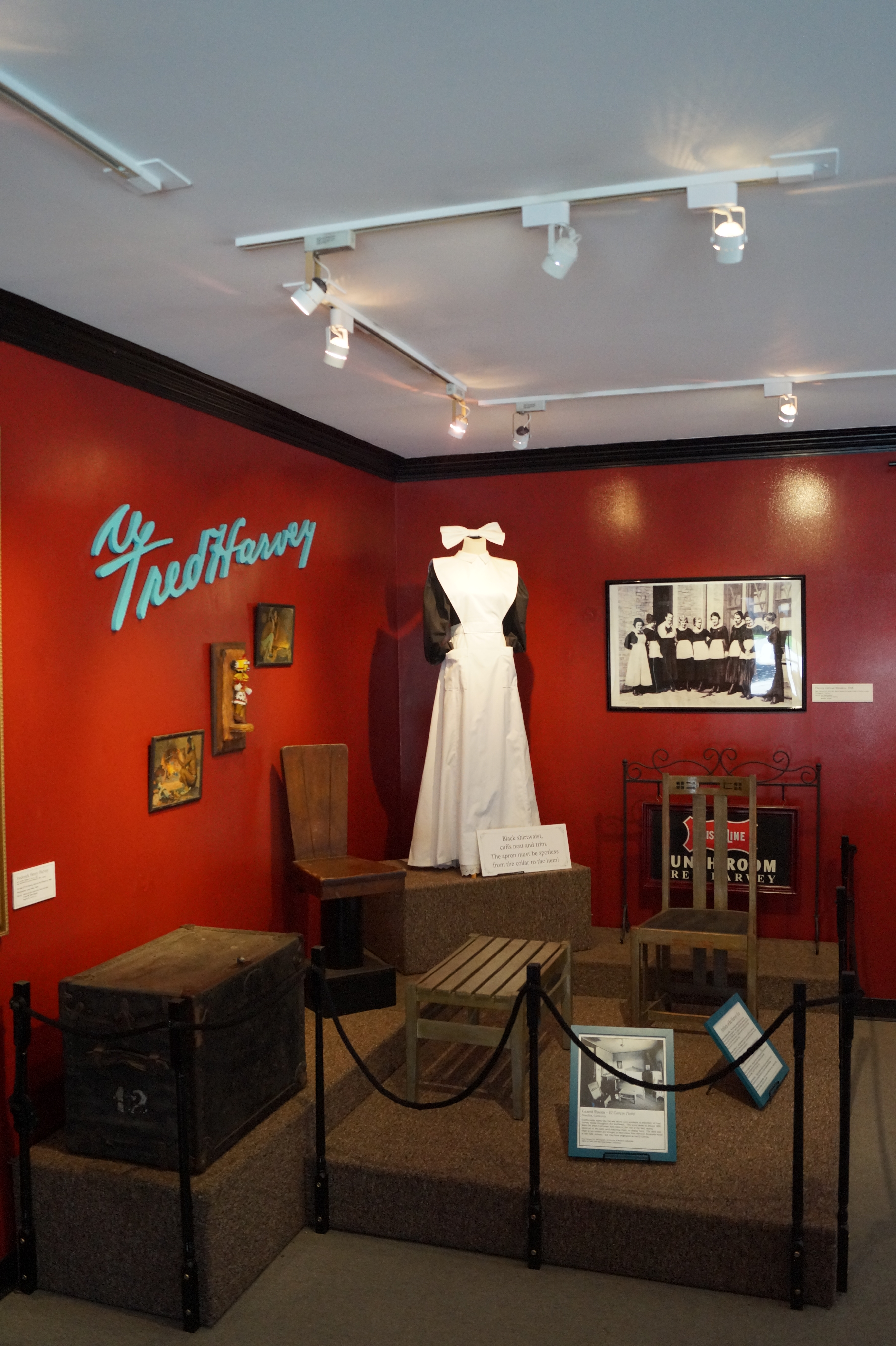 Travel Town Museum is a transport museum dedicated in the northwest corner of Los Angeles, California's Griffith Park. The history of railroad transportation in the western United States from 1880 to the 1930s is the primary focus of the museum's collection, with an emphasis on railroading in Southern California and the Los Angeles area.